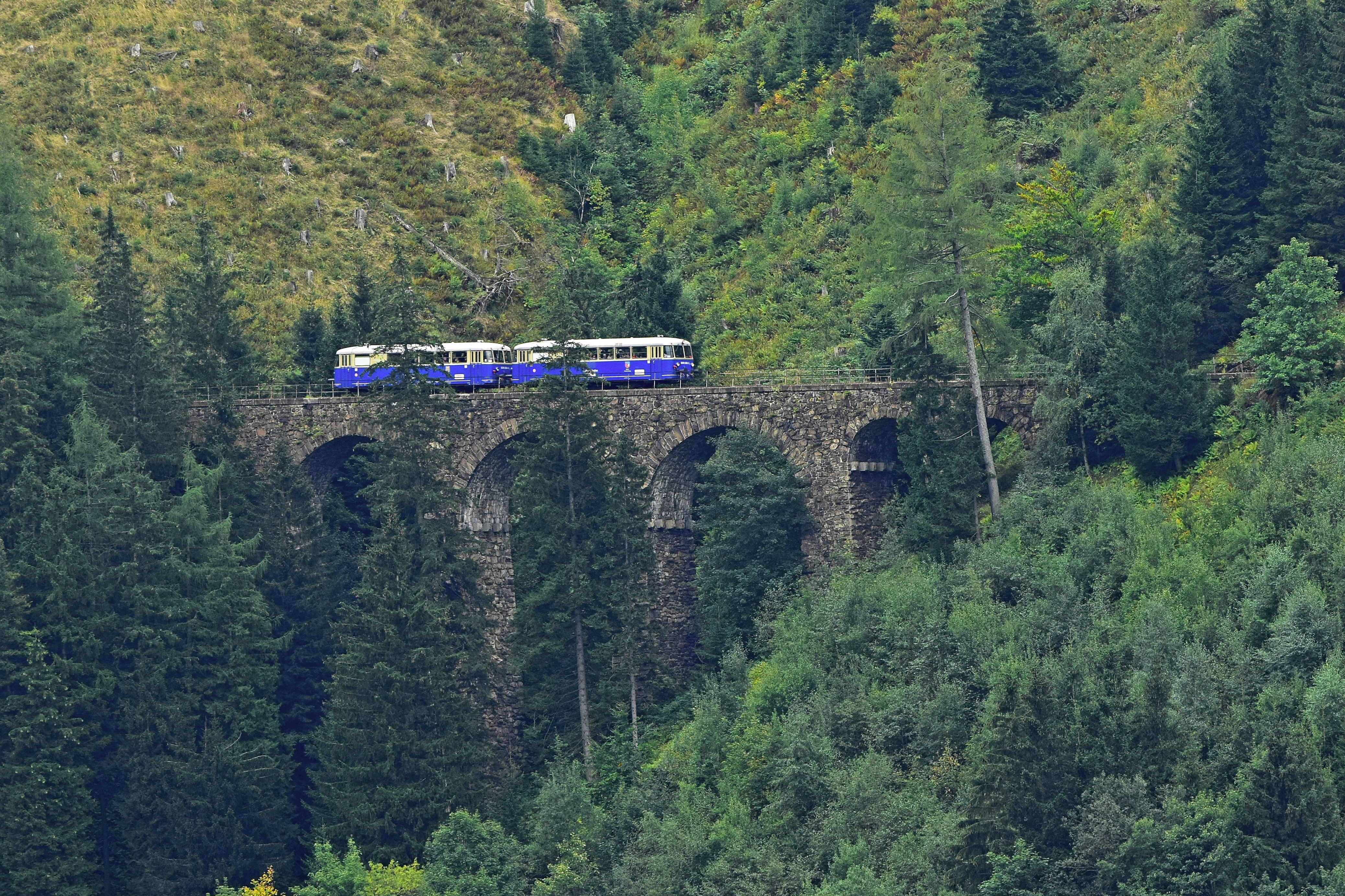 Gesamtanlage Erzbergbahn, diverse Anlagenteile Dieses Bild wurde anlässlich des österreichischen Tags des Denkmals 2015 in der Steiermark eingereicht.